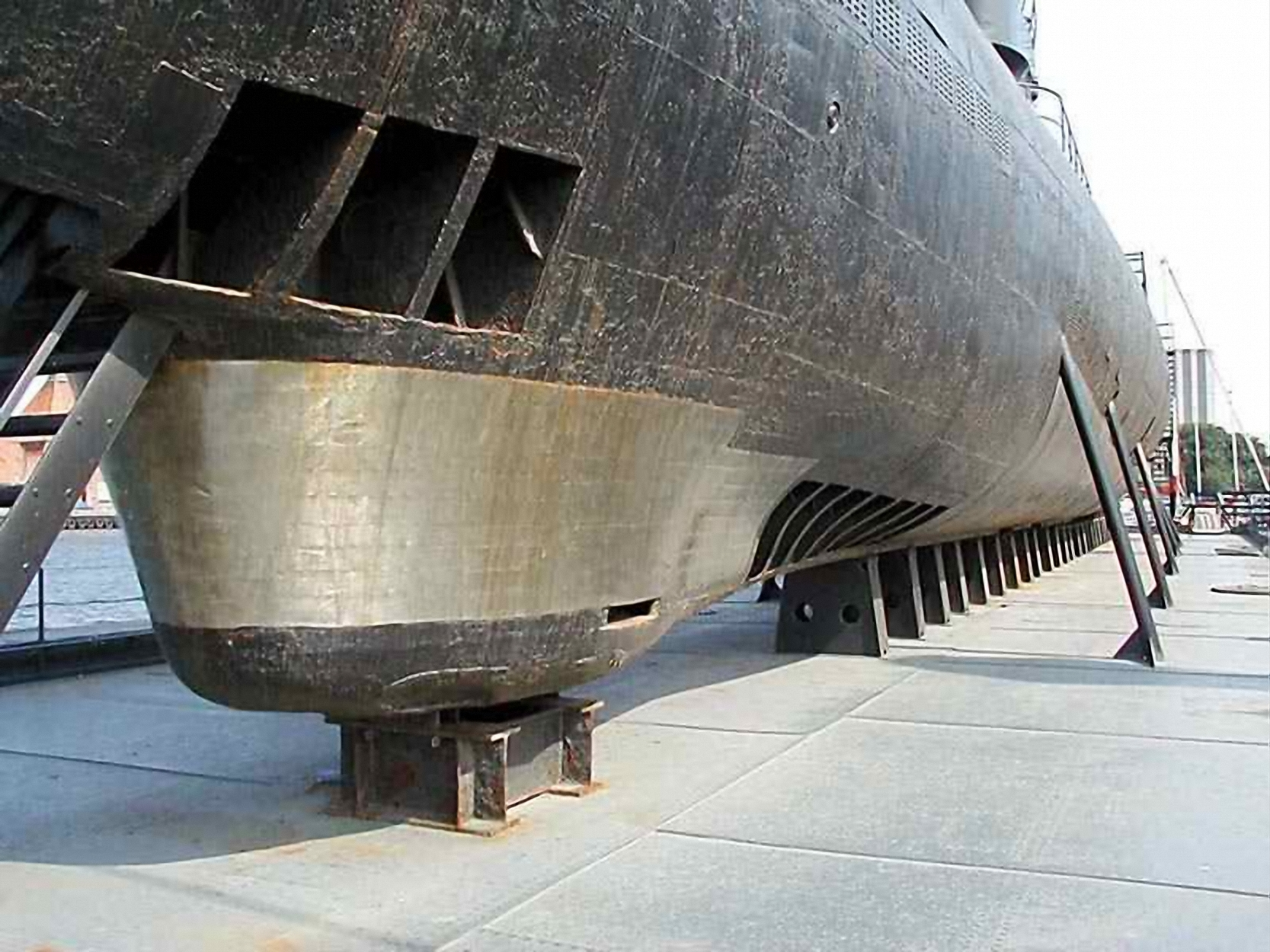 Подводные лодки проекта 613 - Модель 359 в Naksov, Дании, как корабль музей